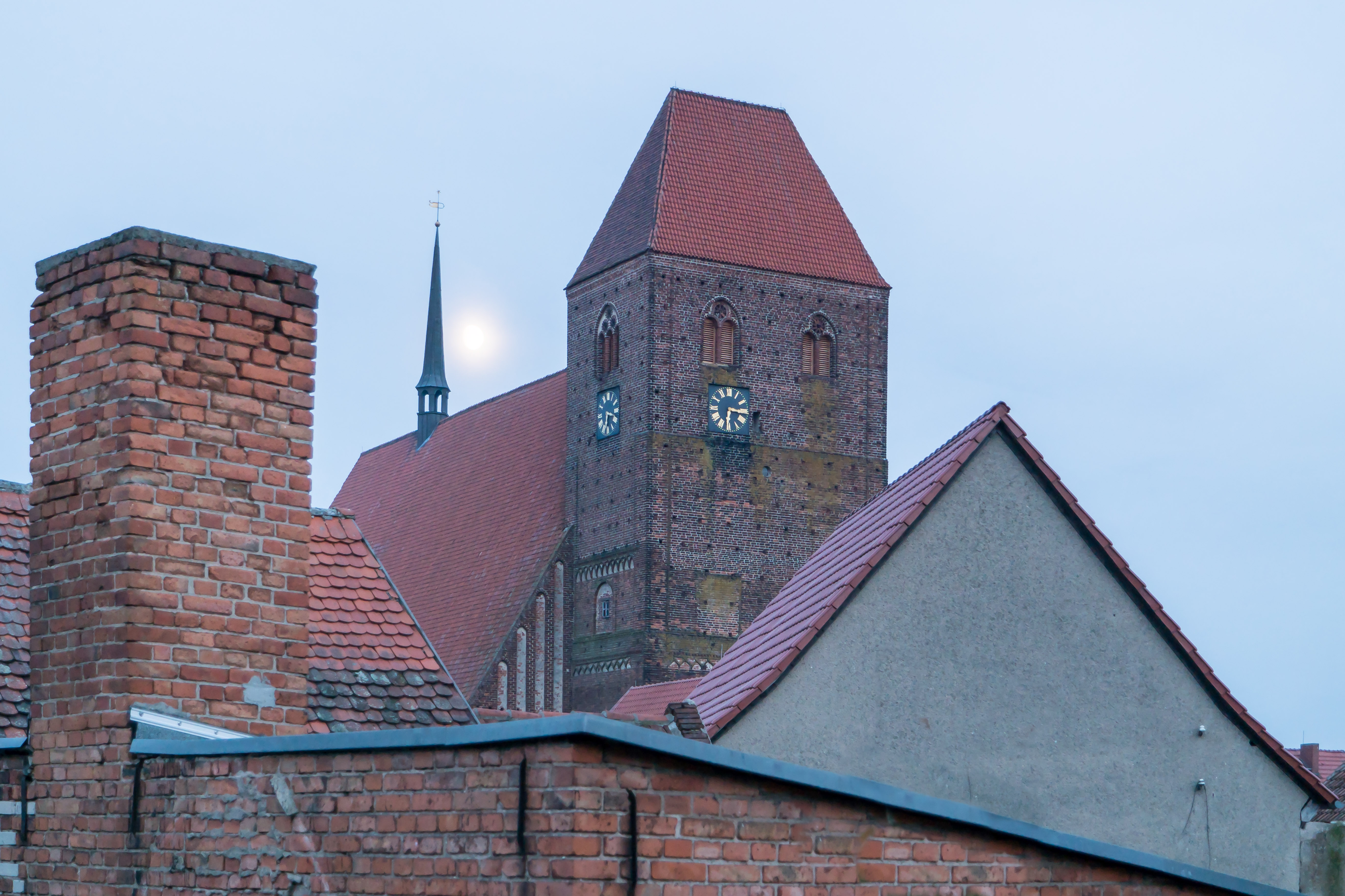 St. Johannes, auf dem Kirchplatz in Werben (Elbe)